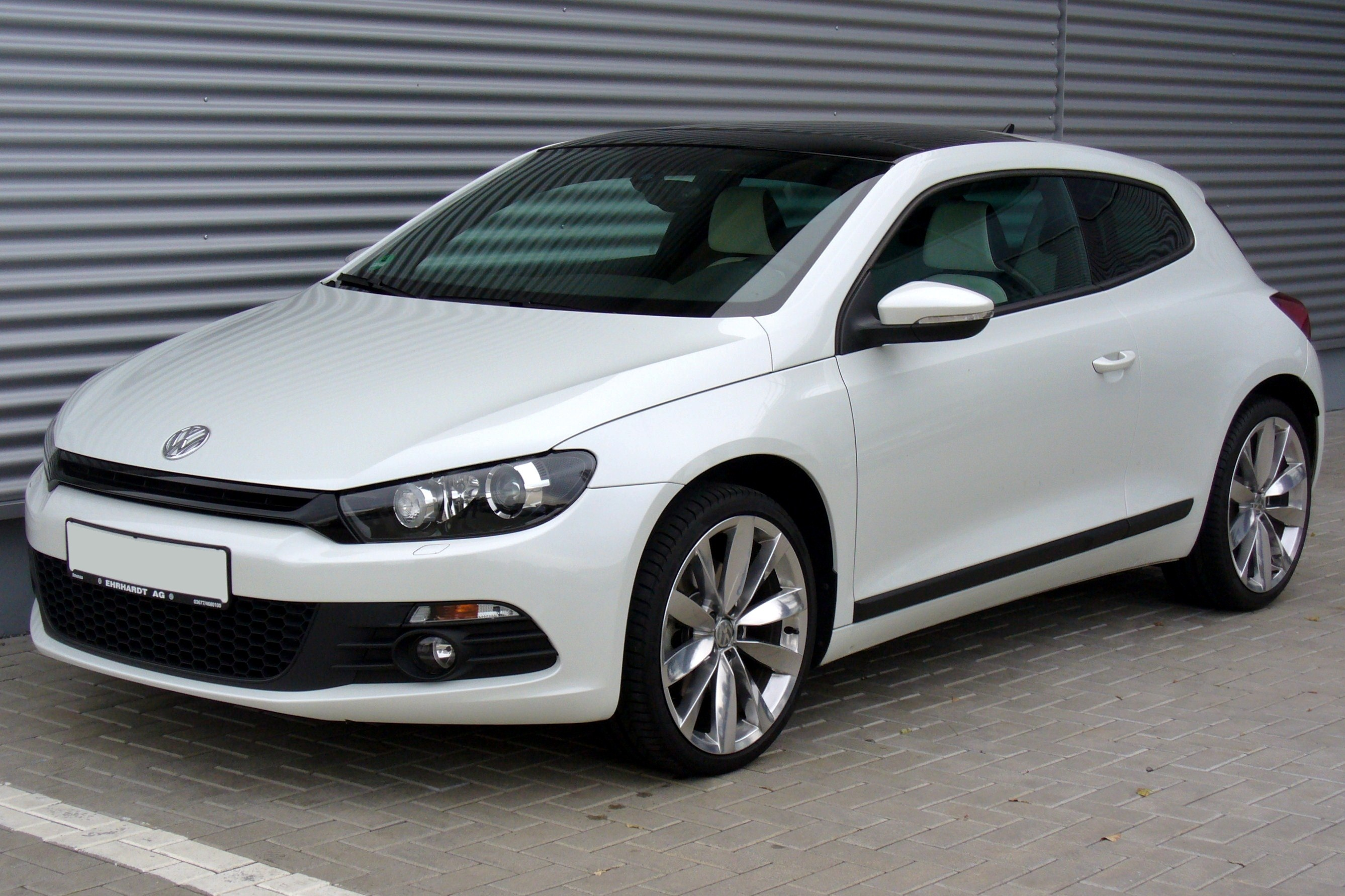 VW Scirocco III